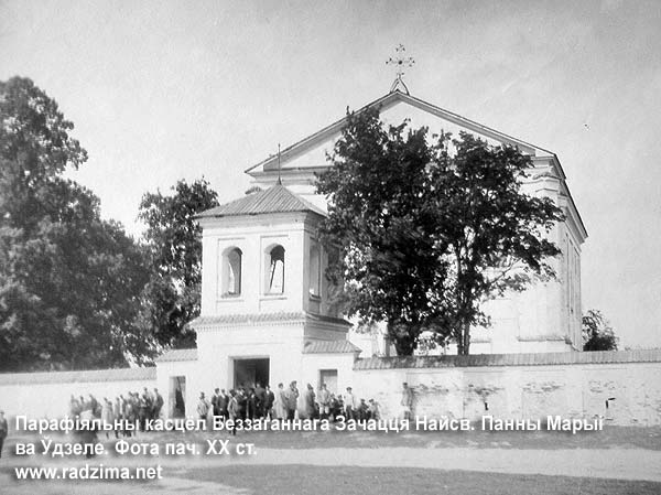 Беларуская (тарашкевіца): Удзела (Udzieła). Касьцёл